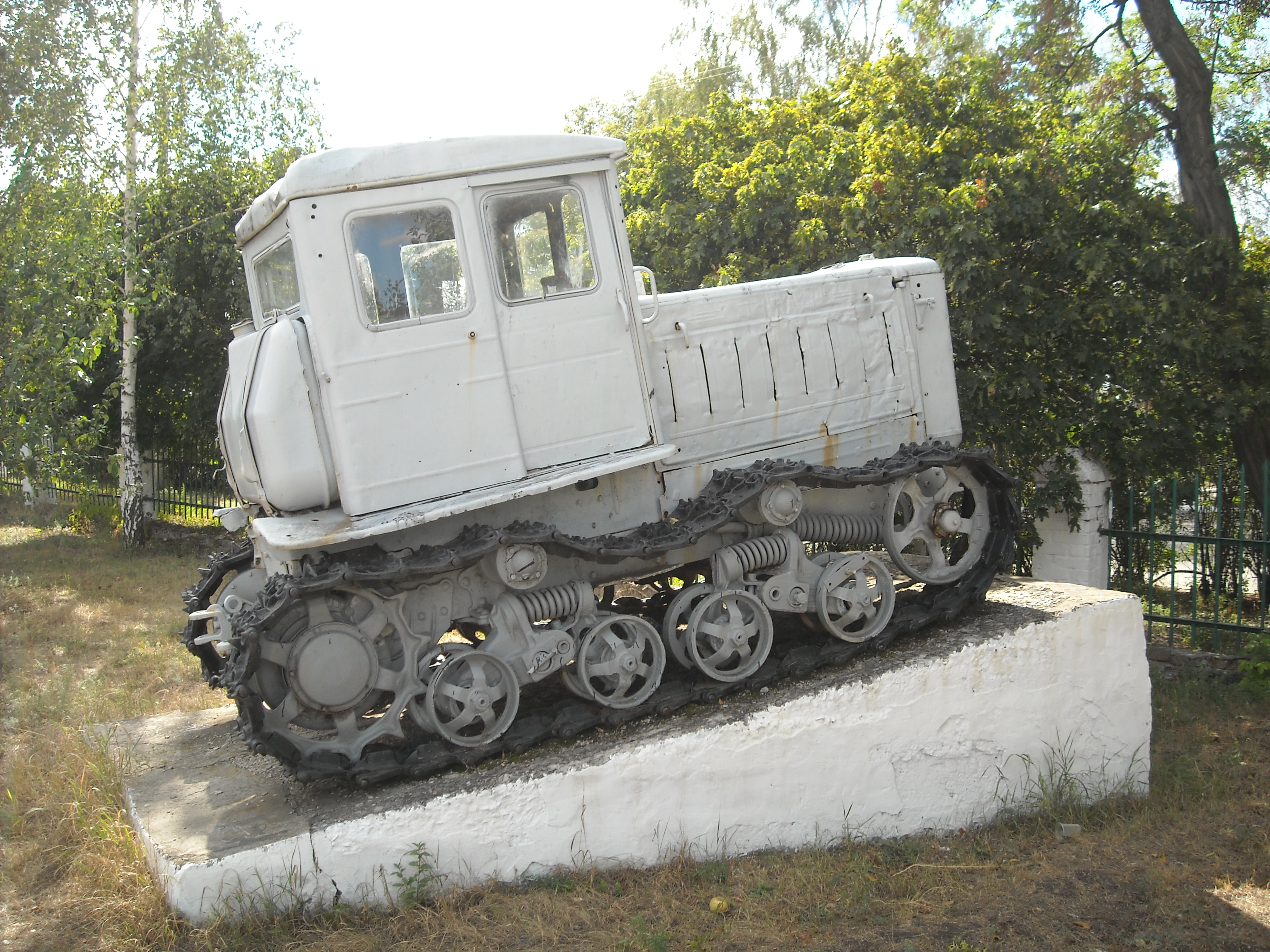 Україна. Харківська область. Нововодолазький район. Рокитне. Пам'ятник-трактор на подвір'ї Рокитнянського професійного аграрного ліцею, який знаходиться в колишньому маєтку куликовських.